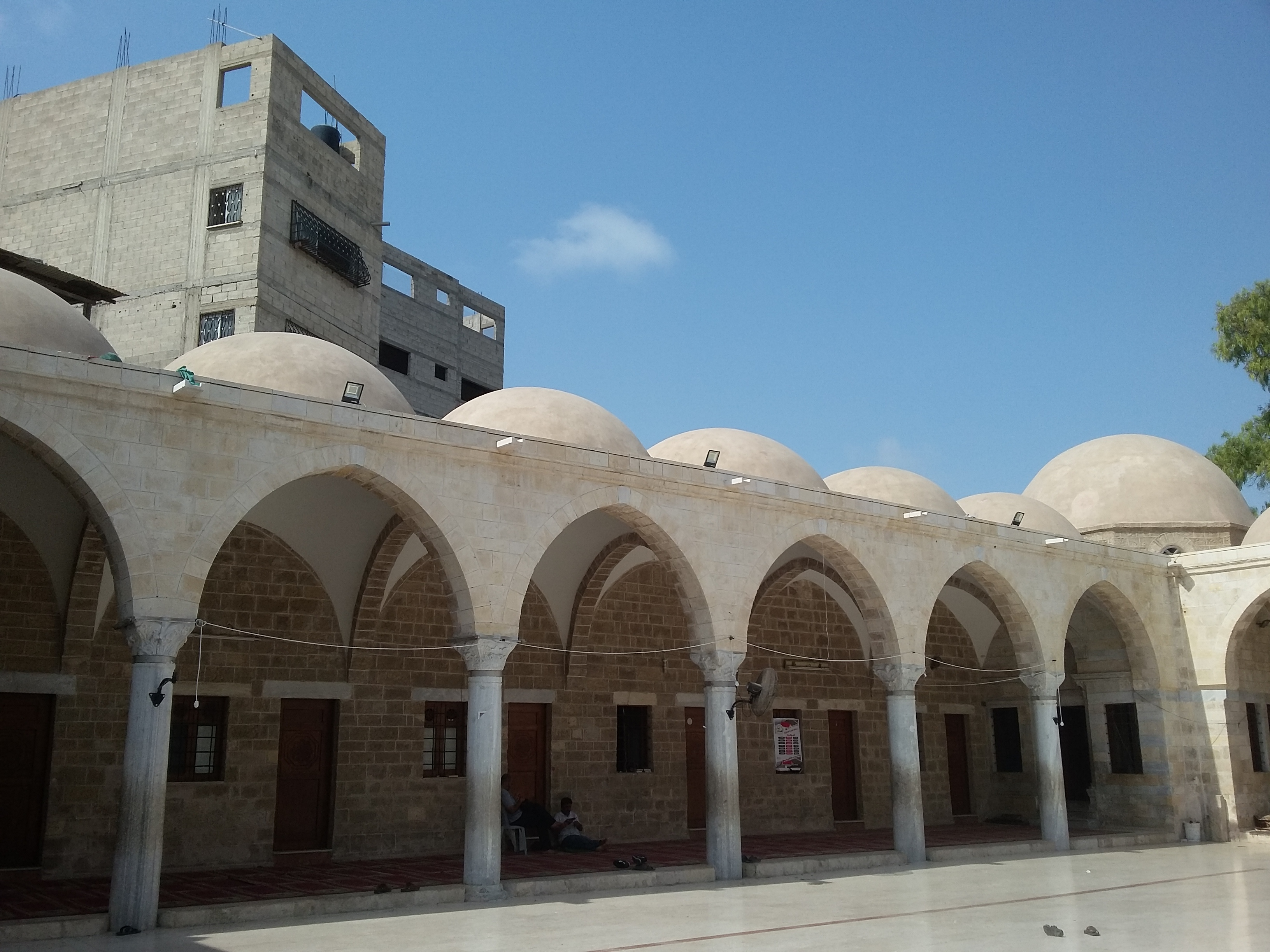 صورة اخرى من زاوية اخرى لقباب مسجد السيد هاشم في غزة-فلسطين